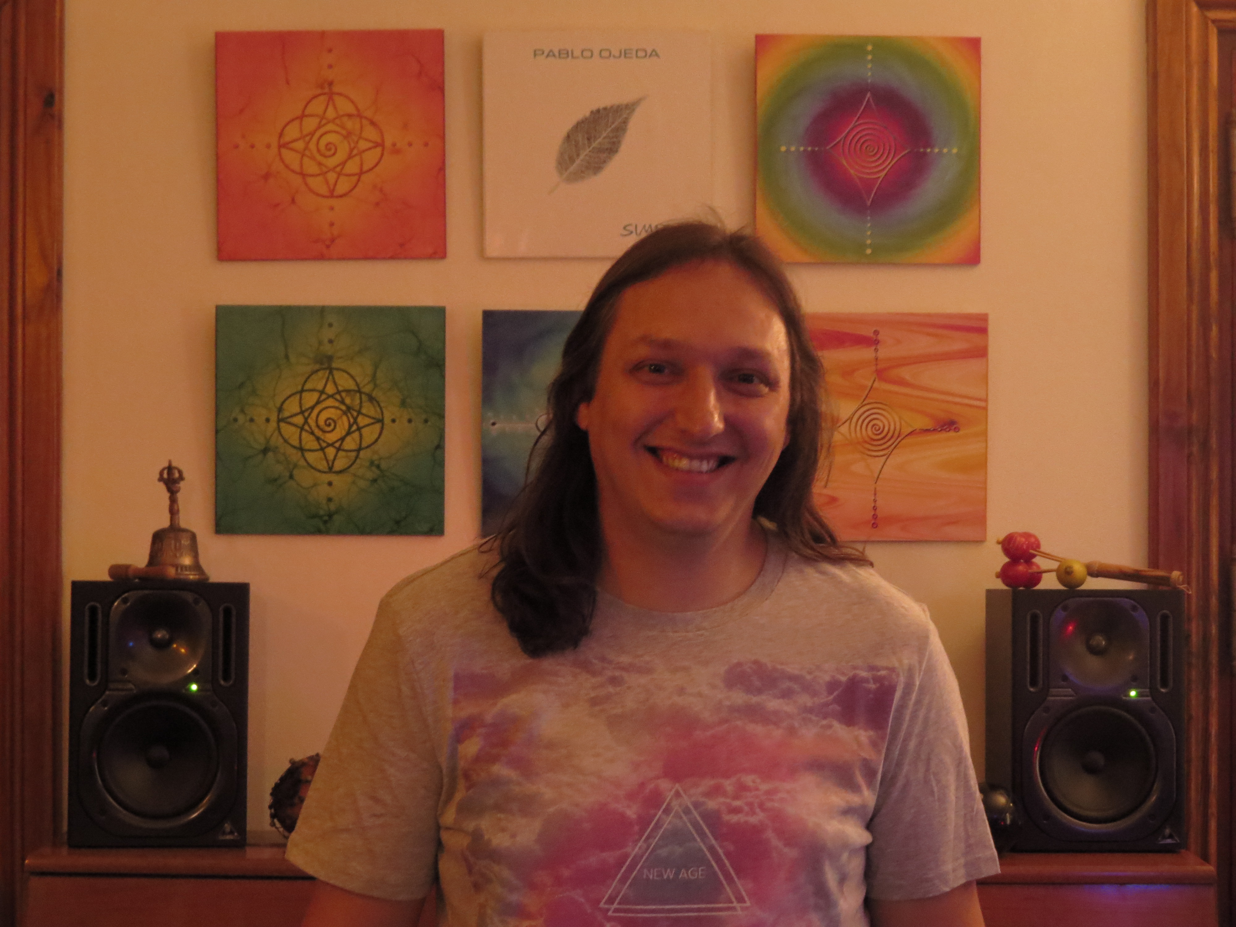 Pablo Ojeda Music